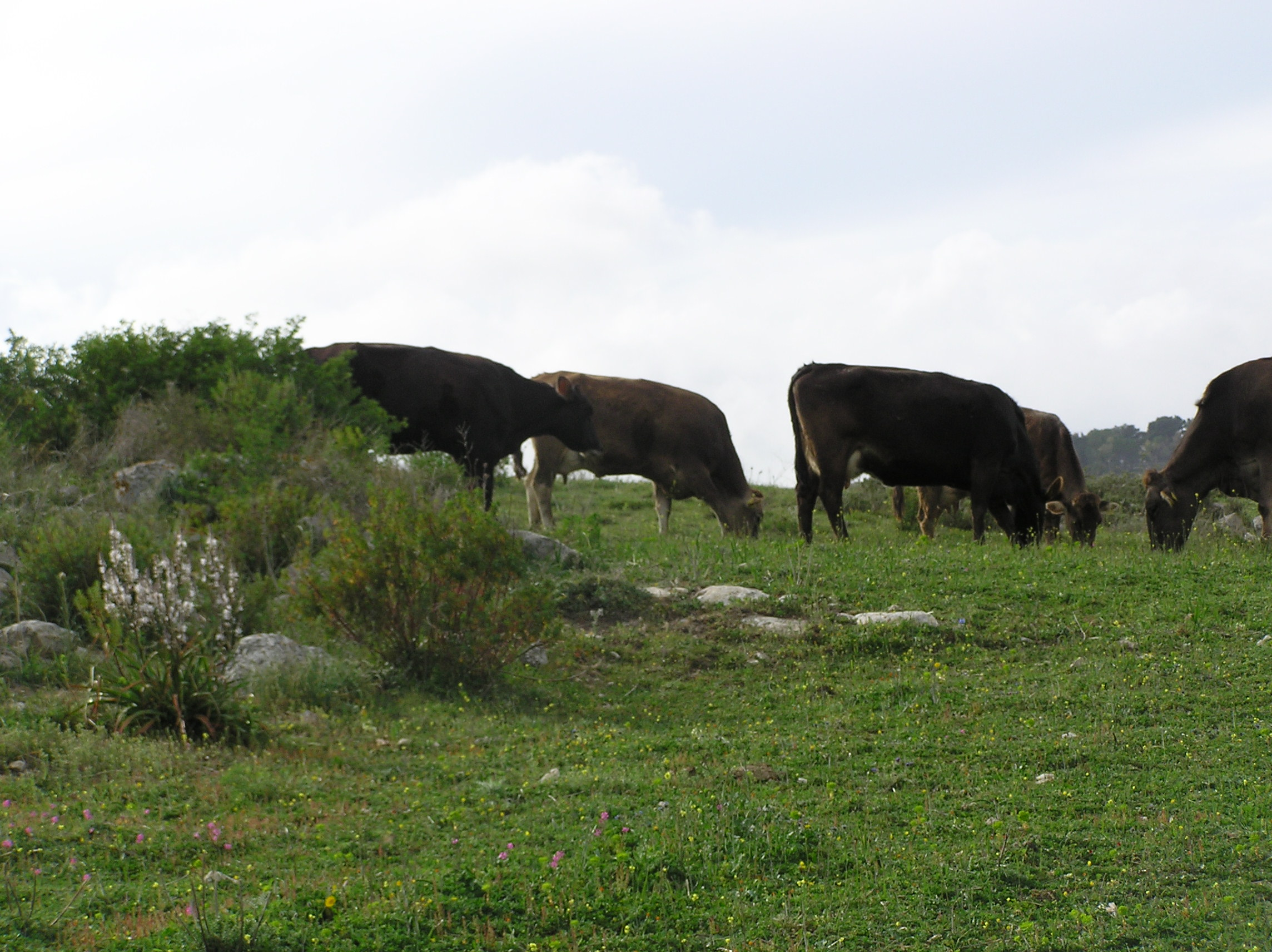 Bestiame Ragusano